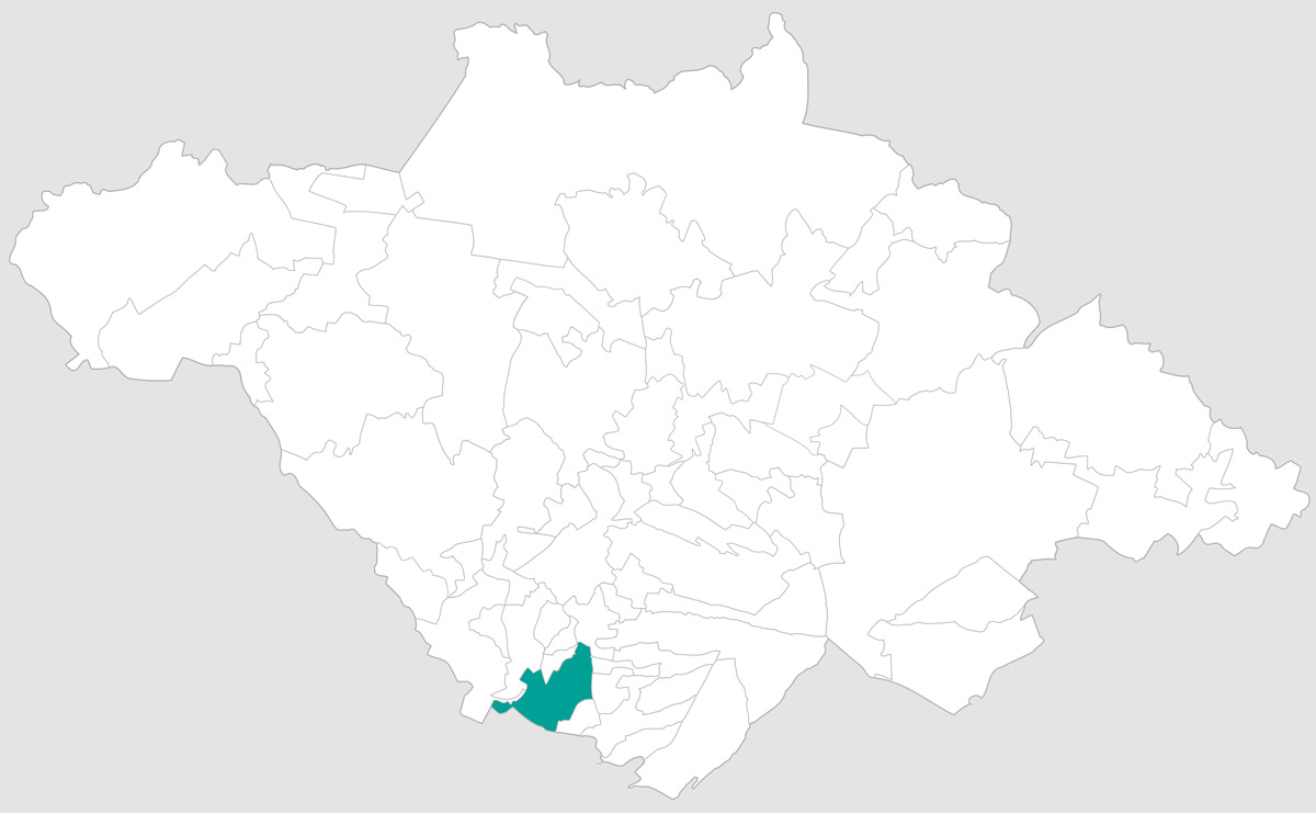 Ubicacion del municipio de Zacatelco